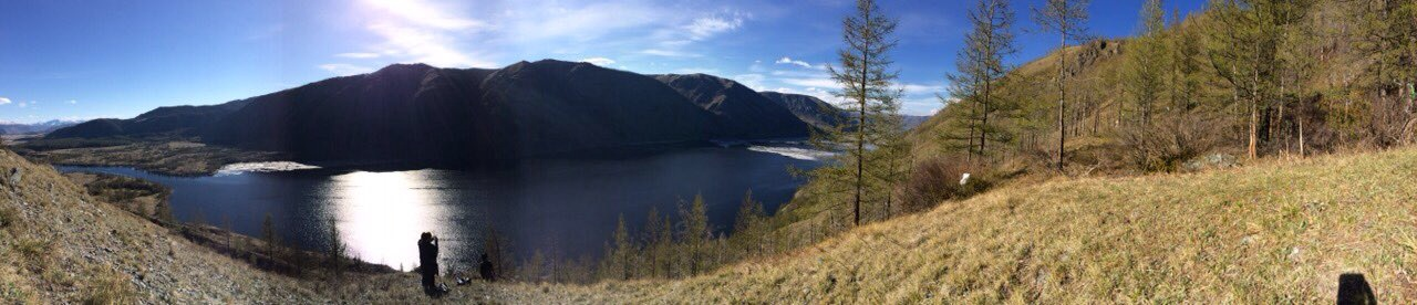 Озеро Кара-Холь: Озеро Кара-Холь расположено в северной части на землях муниципального образования "Бай-Тайгинский кожуун" Республики Тыва., Бай-Тайгинский кожуун, Тува This image is related to the protected area of Russia number 1710003